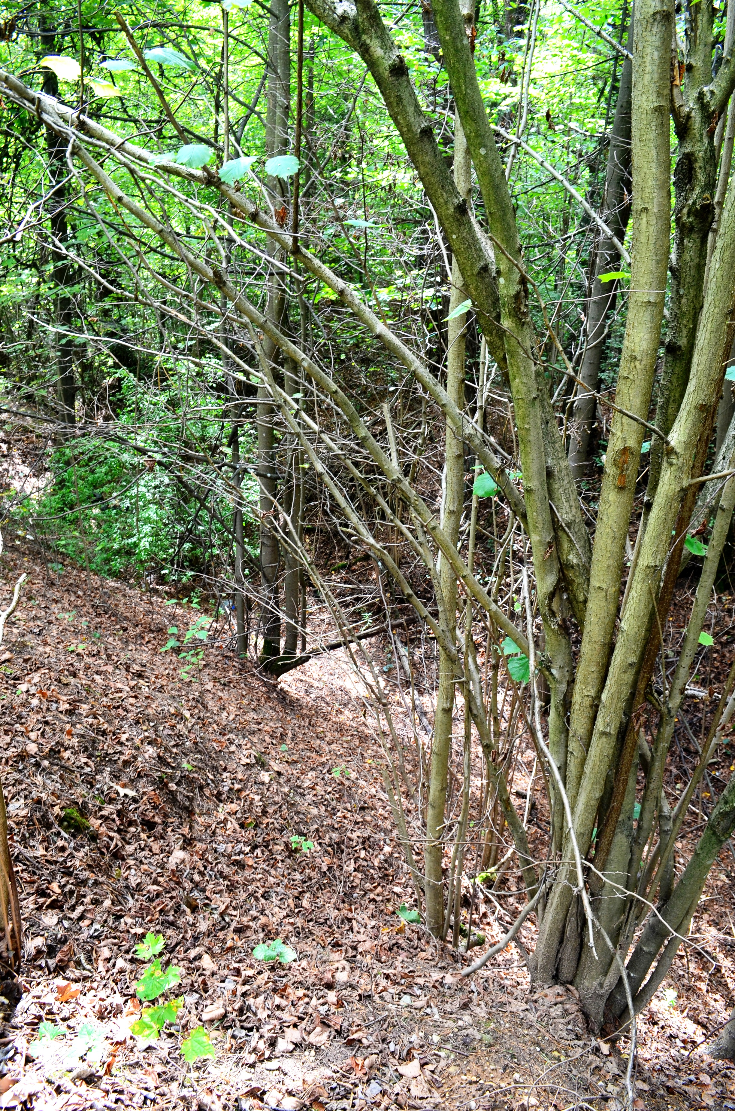 Baltupio aukštupio raguva šalia Geležinio Vilko g., Vilnius